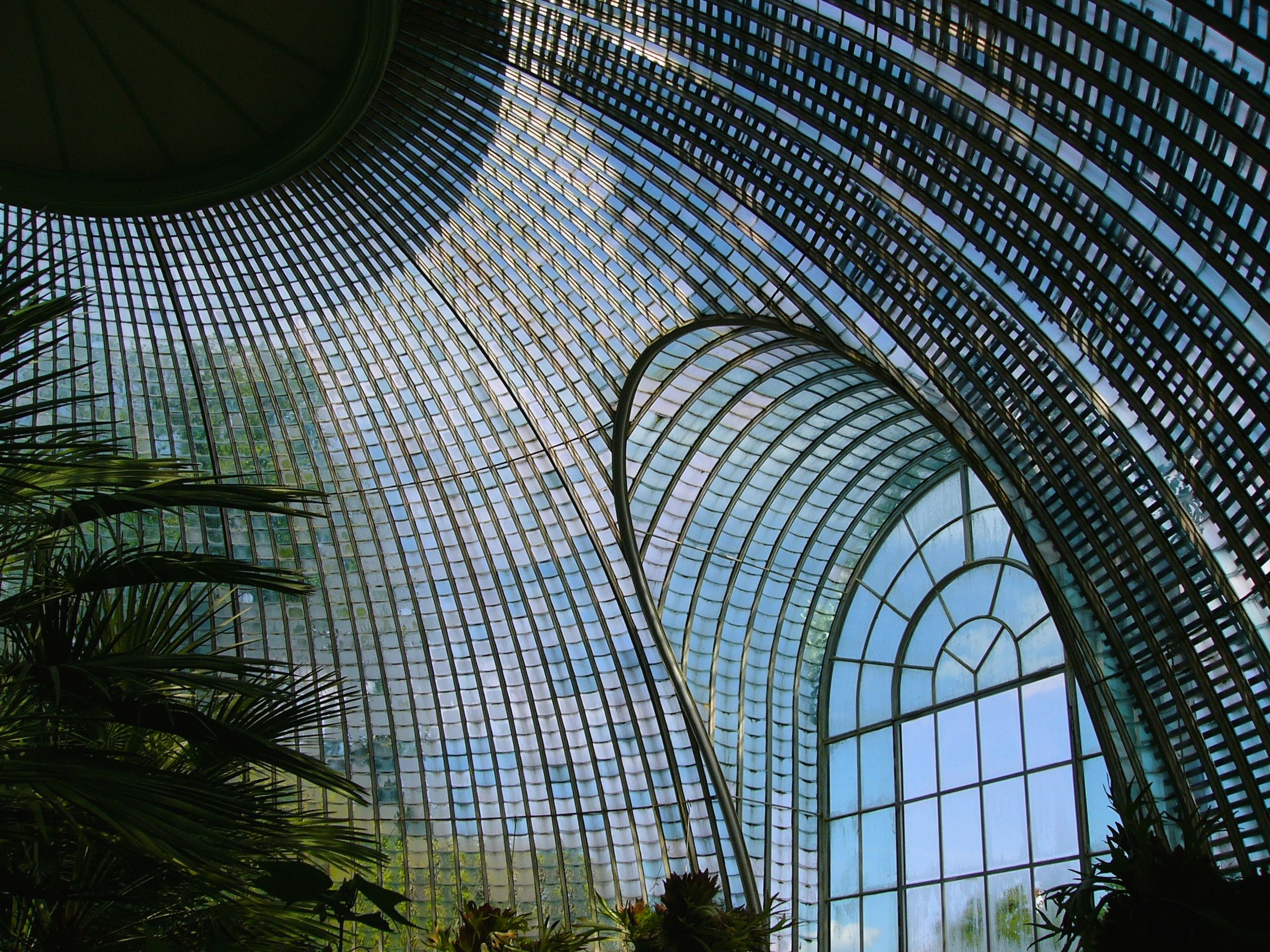 Interiér zámeckého skleníku